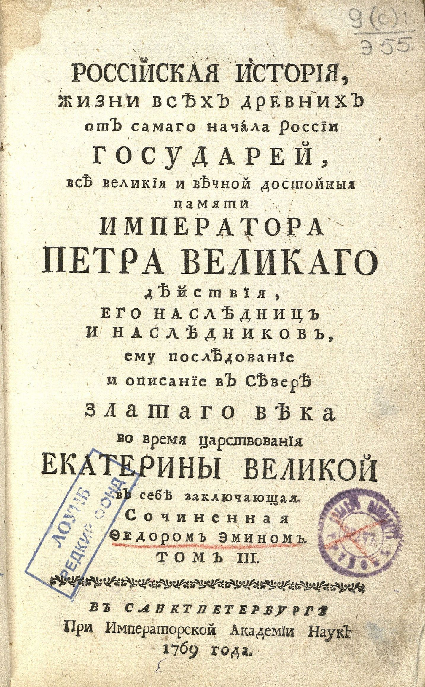 Издание из личной библиотеки М. П. Трунова